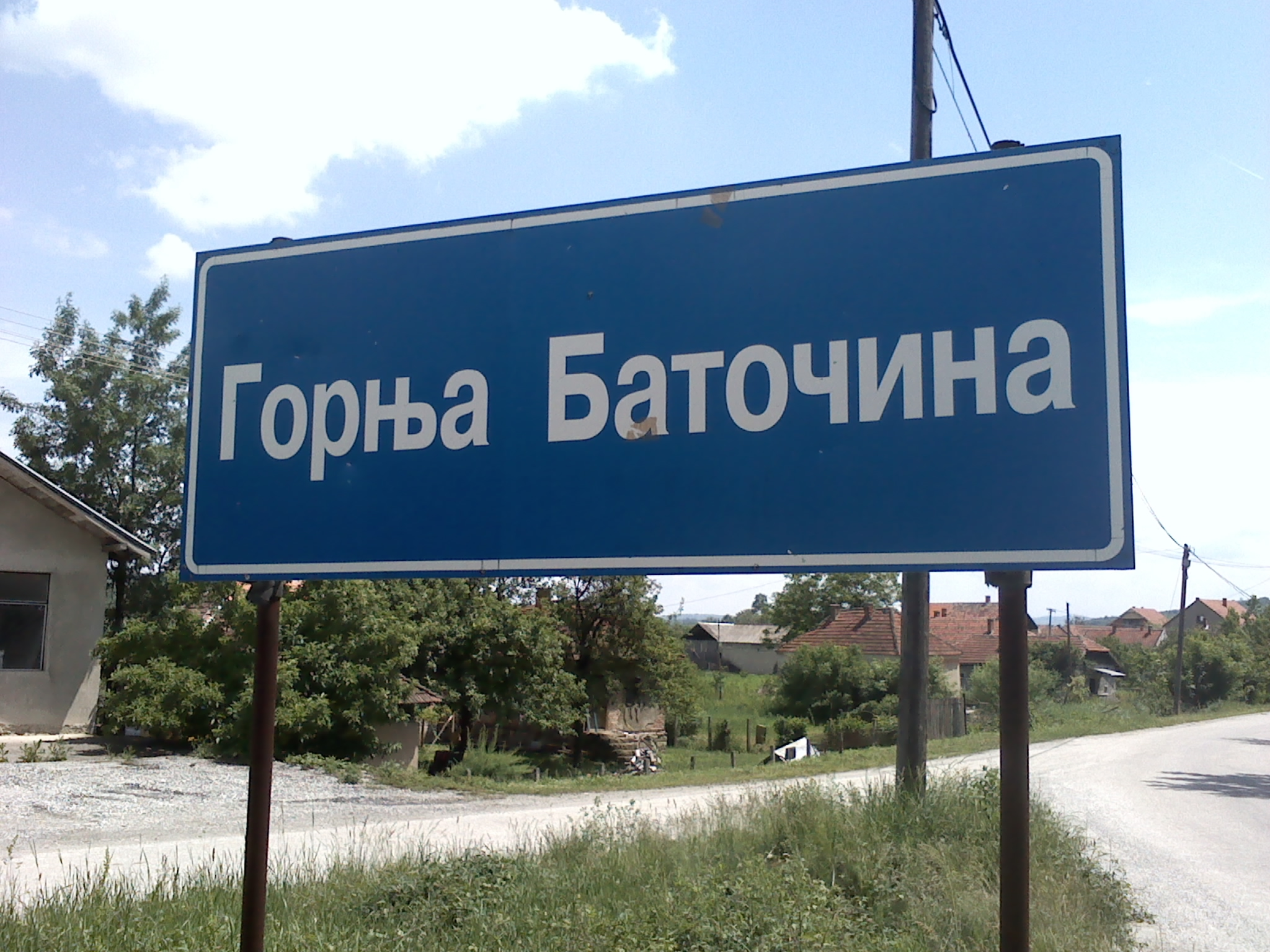 Oznaka za naselje Gornja Batočina.